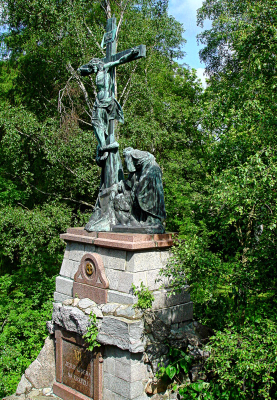 Zespół klasztorny oo. Paulinów: Kościół pw. Wniebowzięcia NMP i Znalezienia Krzyża Św. z kaplicami, zakrystią, skarbcem, wieżą, klasztorem, zabudowaniami gospodarczymi, arsenałem, drukarnią, domem muzykantów, twierdzą z bramami i bastionami, park Częstochowa, Częstochowa 02.1978.